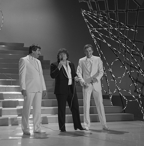 André Hazes in het Nederlandse televisieprogramma Showbizzquiz in 1981